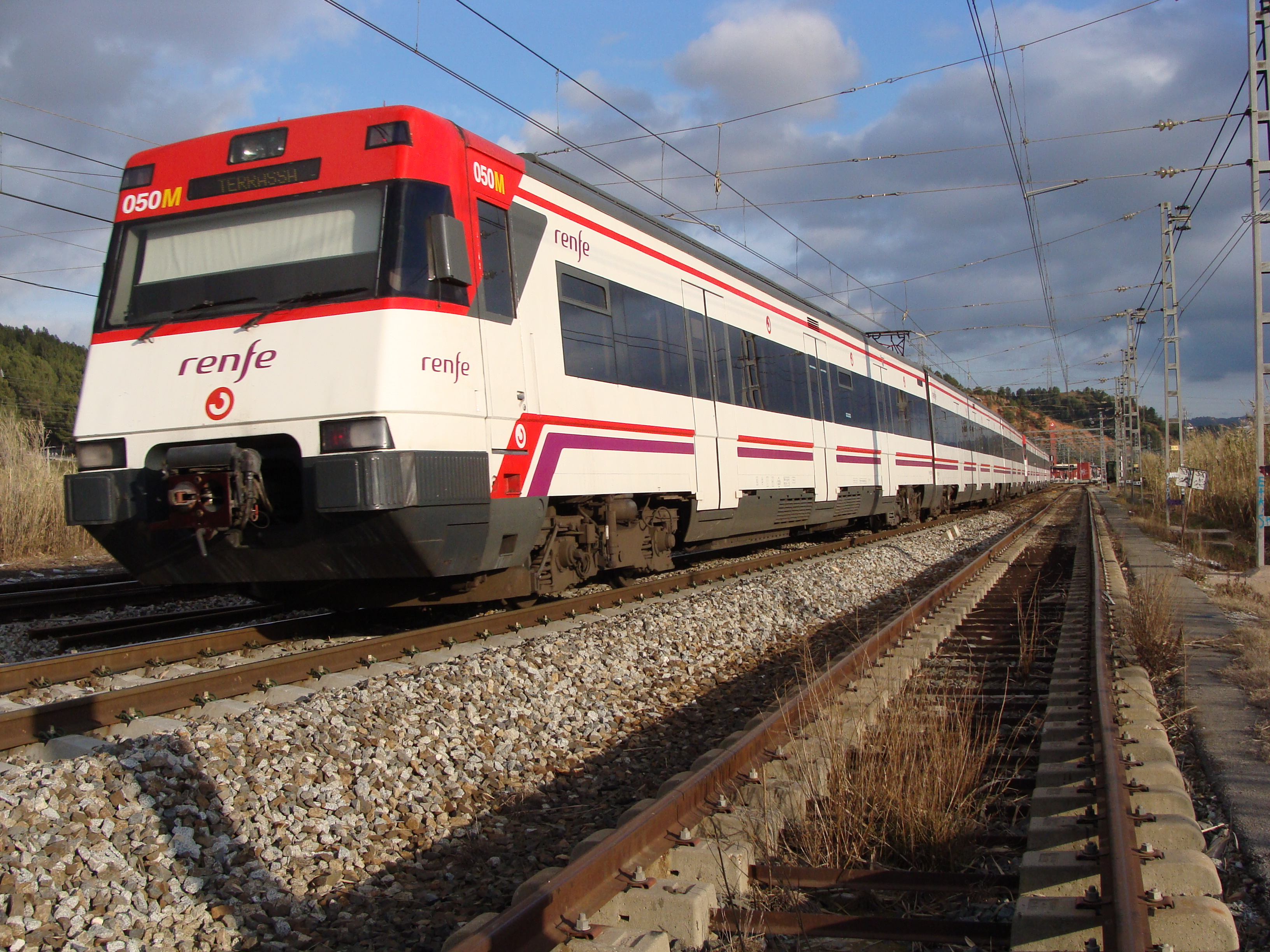 Unitat 447 fent entrada a l'estacio de Castellbisbal cobrint servei de la R4 de Rodalies de Catalunya.